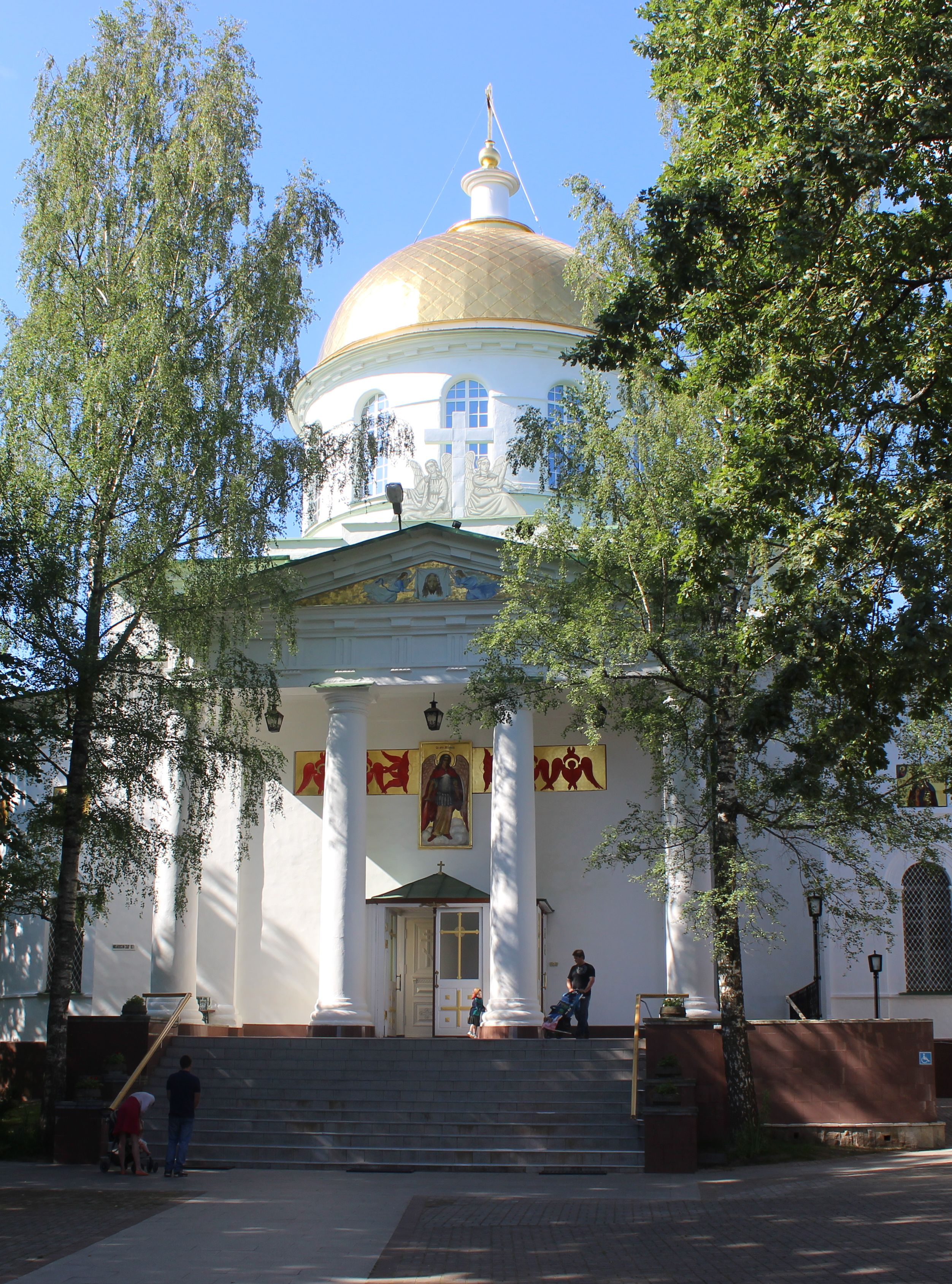 Ансамбль Псково-Печерского монастыря (Псковская область, Печоры, (на юго-восточной окраине города Печоры))